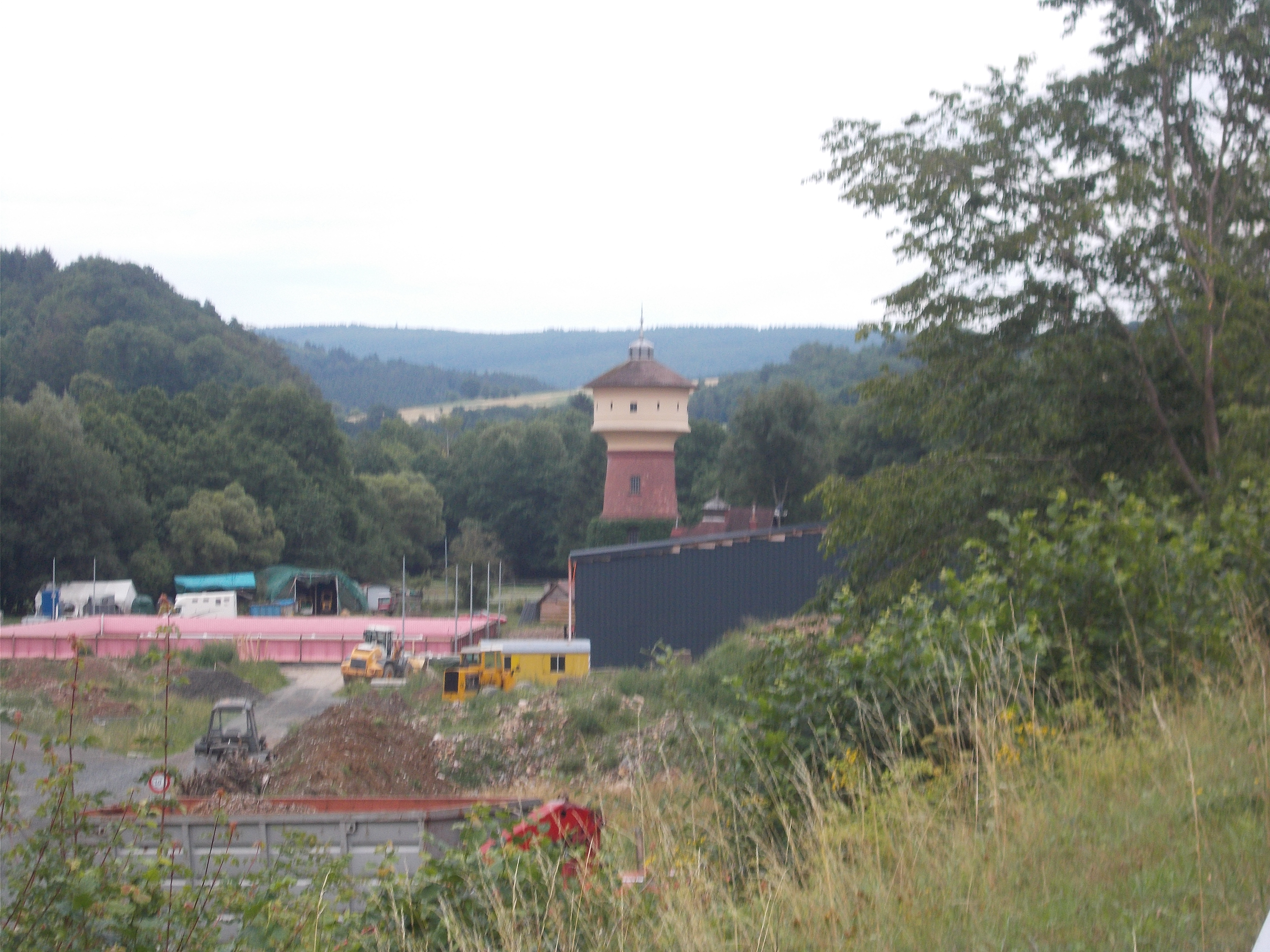 Hochbehälter: dreigeschossiger zylinderförmiger Schaft, Wasserbehälter mit Kegeldach und Dachreiter; Pumpenhaus: eingeschossiger Walmdachbachbau, 1901/02